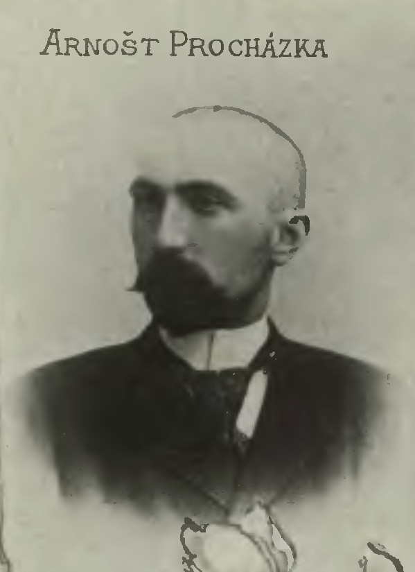 Portrét – Arnošt Leopold Antonín Procházka (1869 - 1925), Český literární a výtvarný kritik.